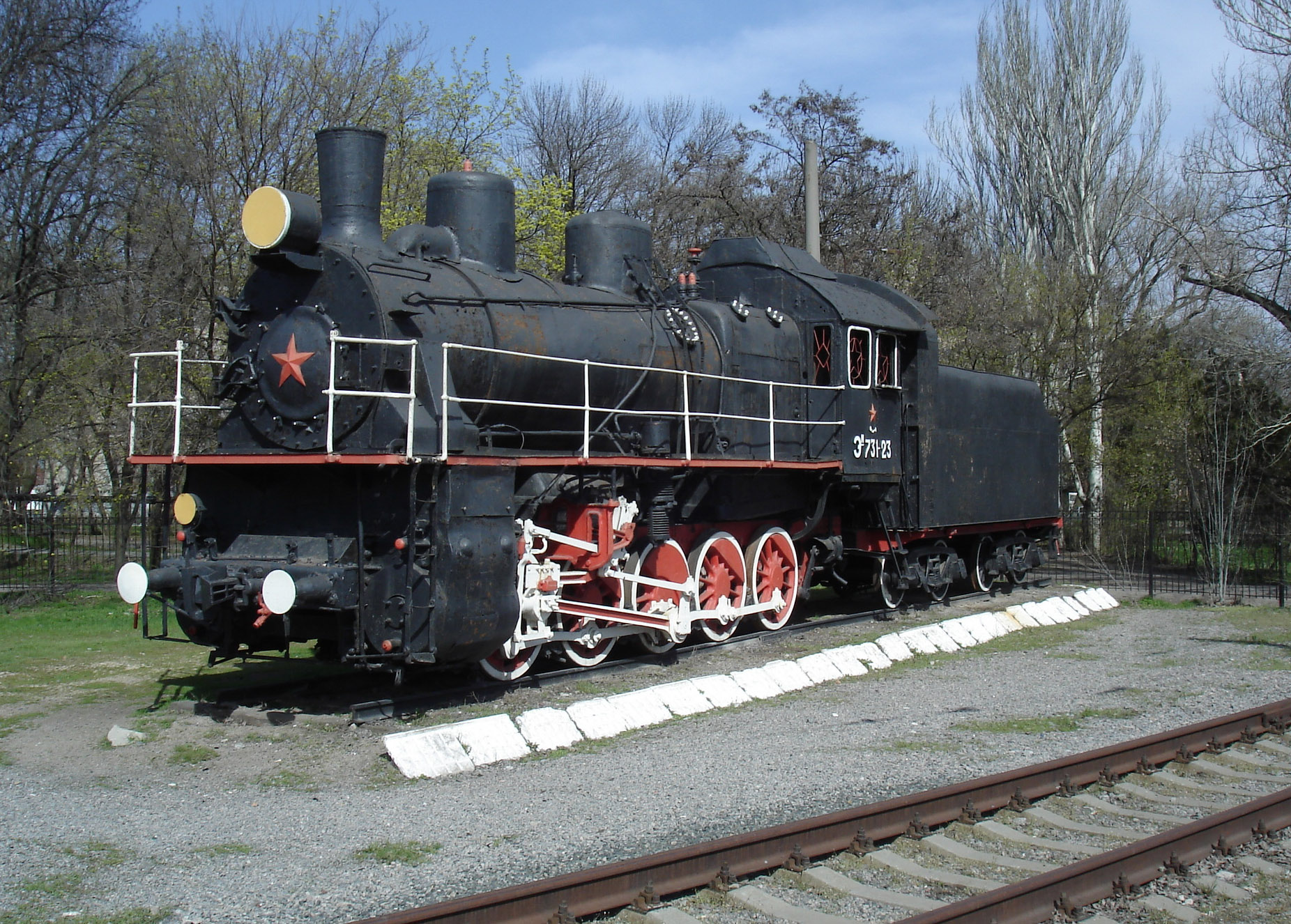 Памятник паровозу серии Э в Мелитополе (возле ЖД-вокзала)